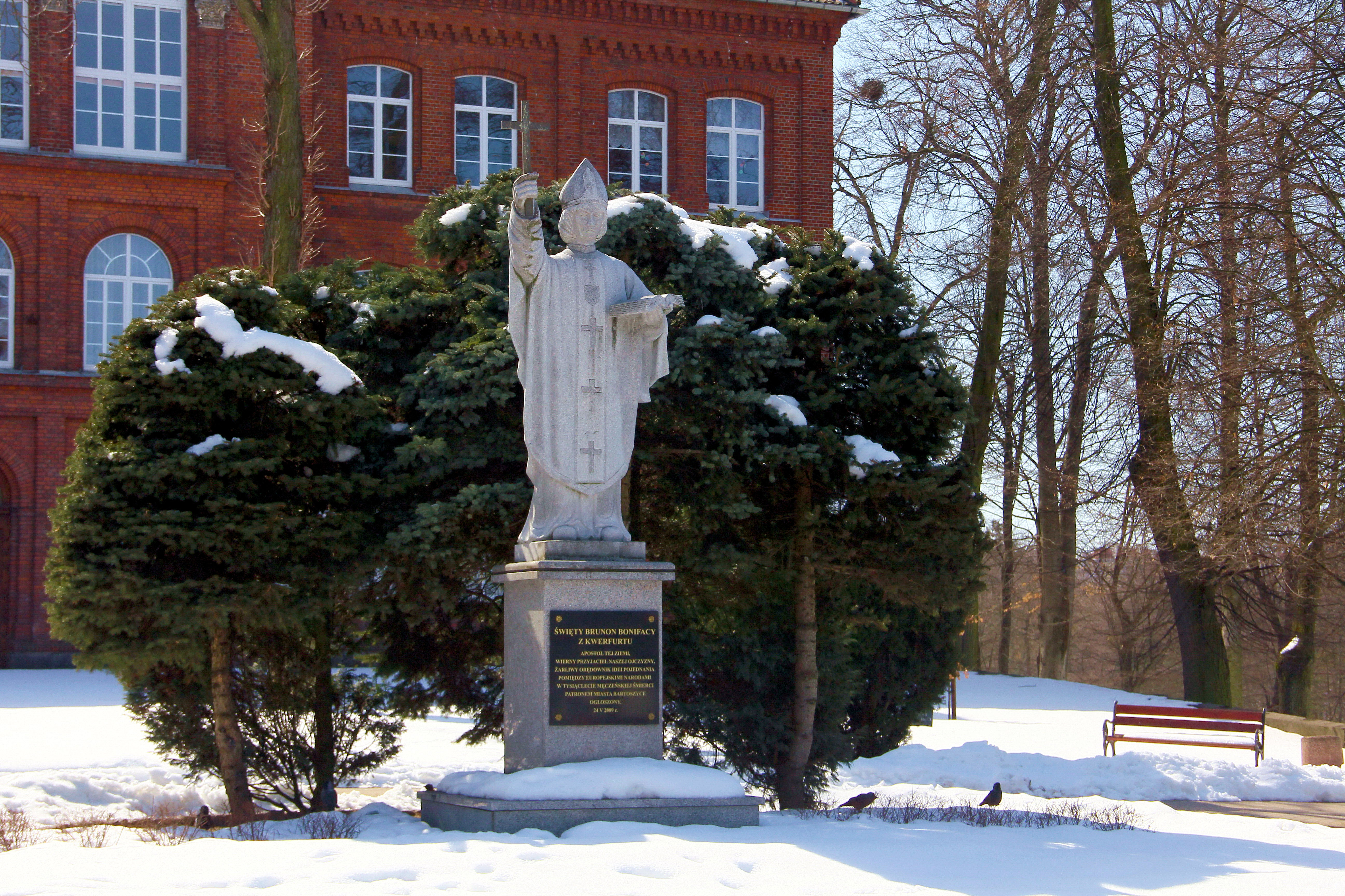 Patron Bartoszyc: św. Brunon Bonifacy z Kwerfurtu.